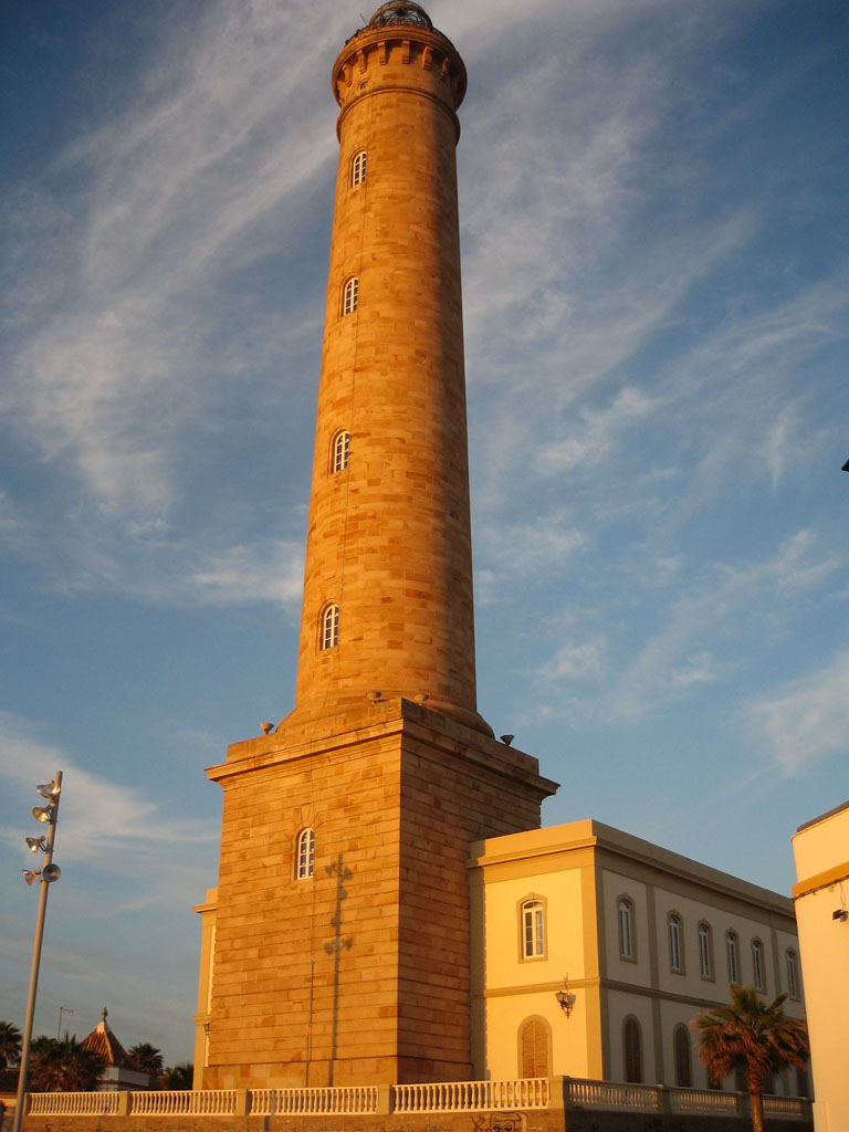 Faro de Chipiona / Chipiona Lighthouse (Cádiz-Andalucía-España)